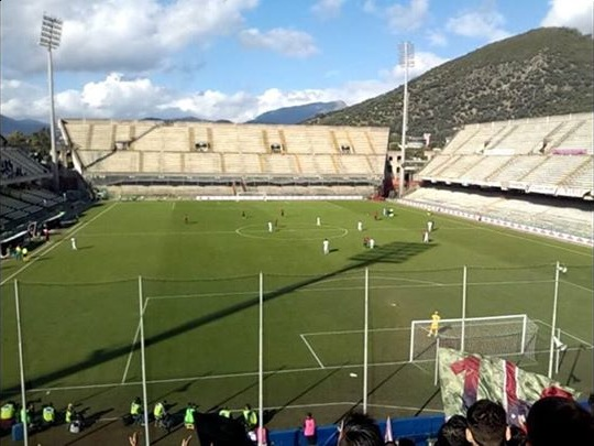 Incontro poi sospeso tra Salernitana e Nocerina (Lega Pro 2013-2014)